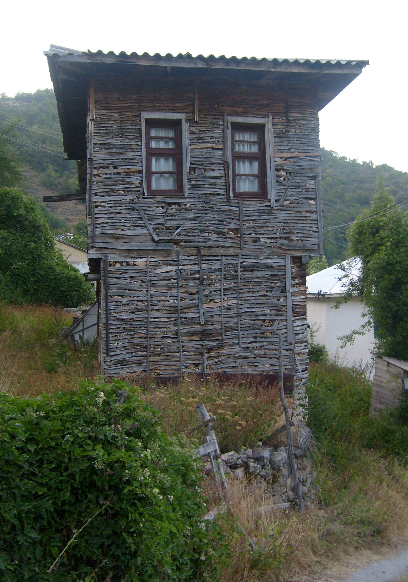 Куќата е изградедна од камен и плитар, фасадата е обложена со дрвени штици "шиндри".